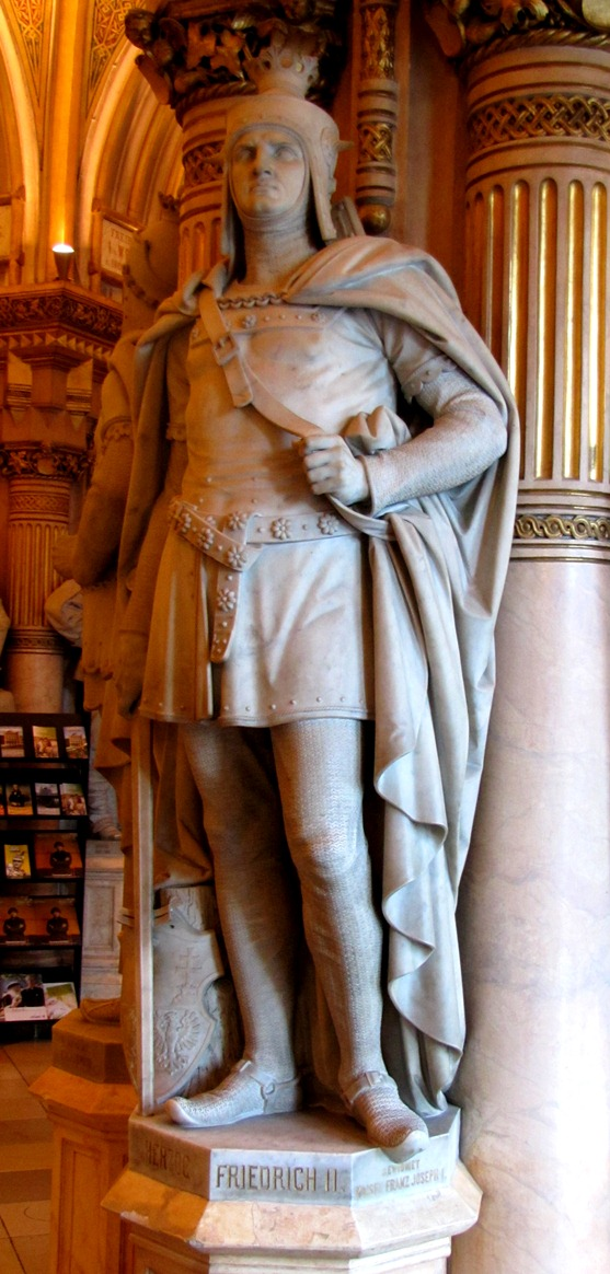 Statue des Herzogs Friedrich II., genannt der Streitbare in der Feldherrenhalle des Heeresgeschichtlichen Museums in Wien.